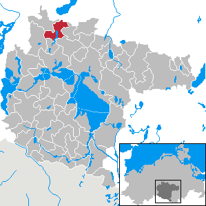 Klocksin im Landkreis Müritz, Mecklenburg-Vorpommern